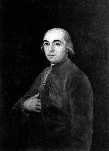 PEDRODEALVARADO2000